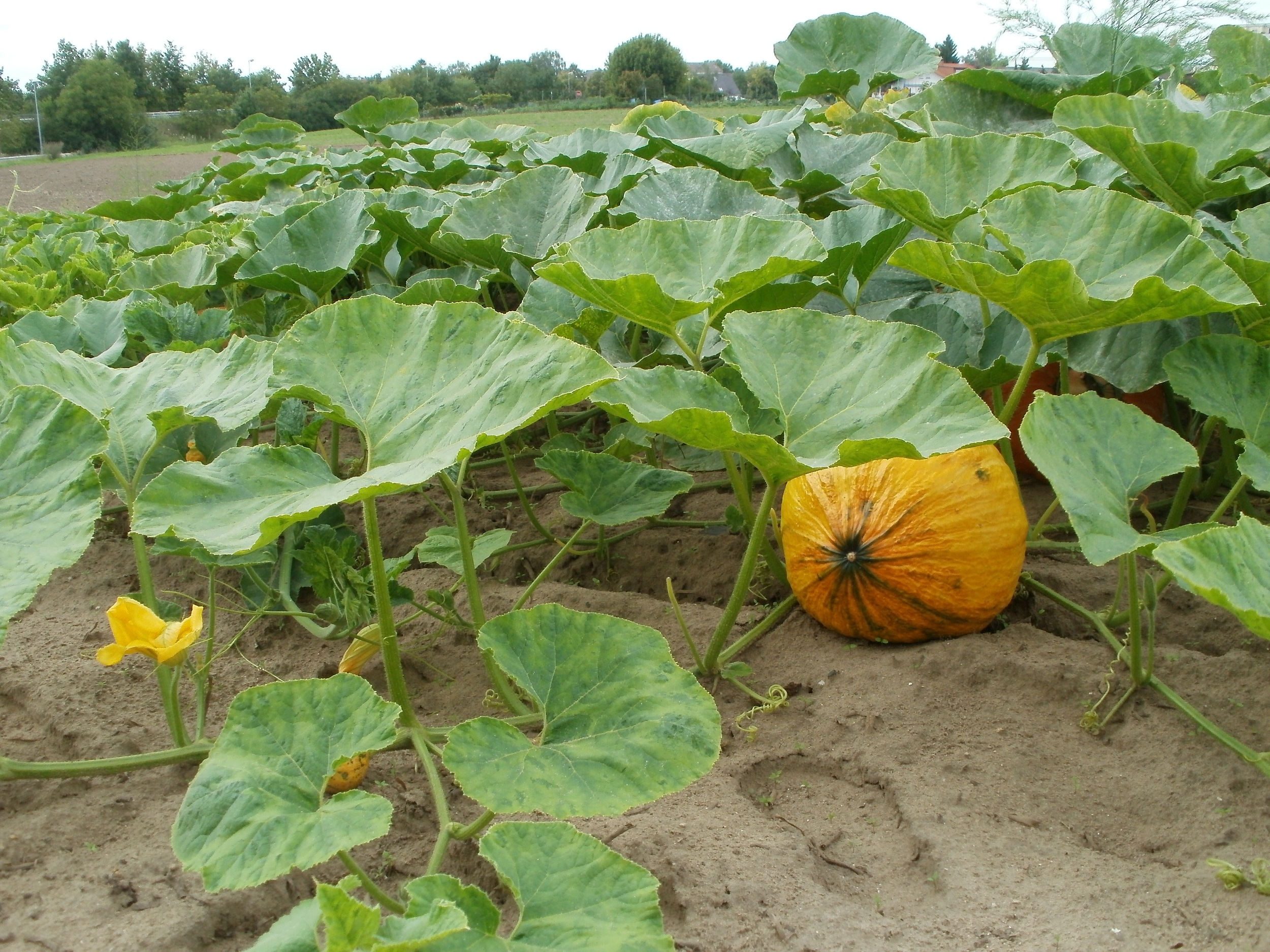 Kürbisfeld an der Friedenshöhe (Oftersheim)